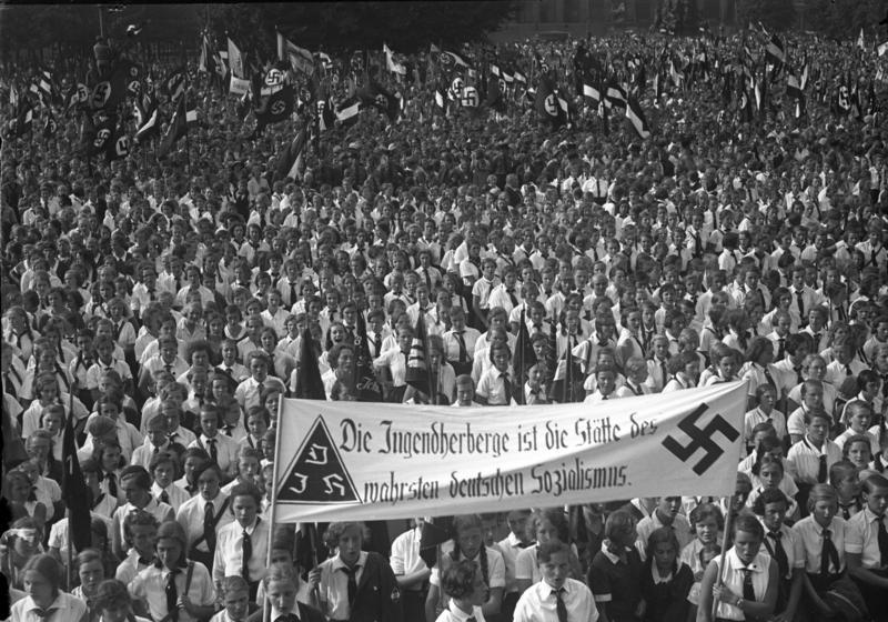 Riesenaufmarsch der Hitlerjugend im Lustgarten in Berlin am 19.8.1933! Über 80.000 Hitlerjungen und Mädchen im Lustgarten in Berlin